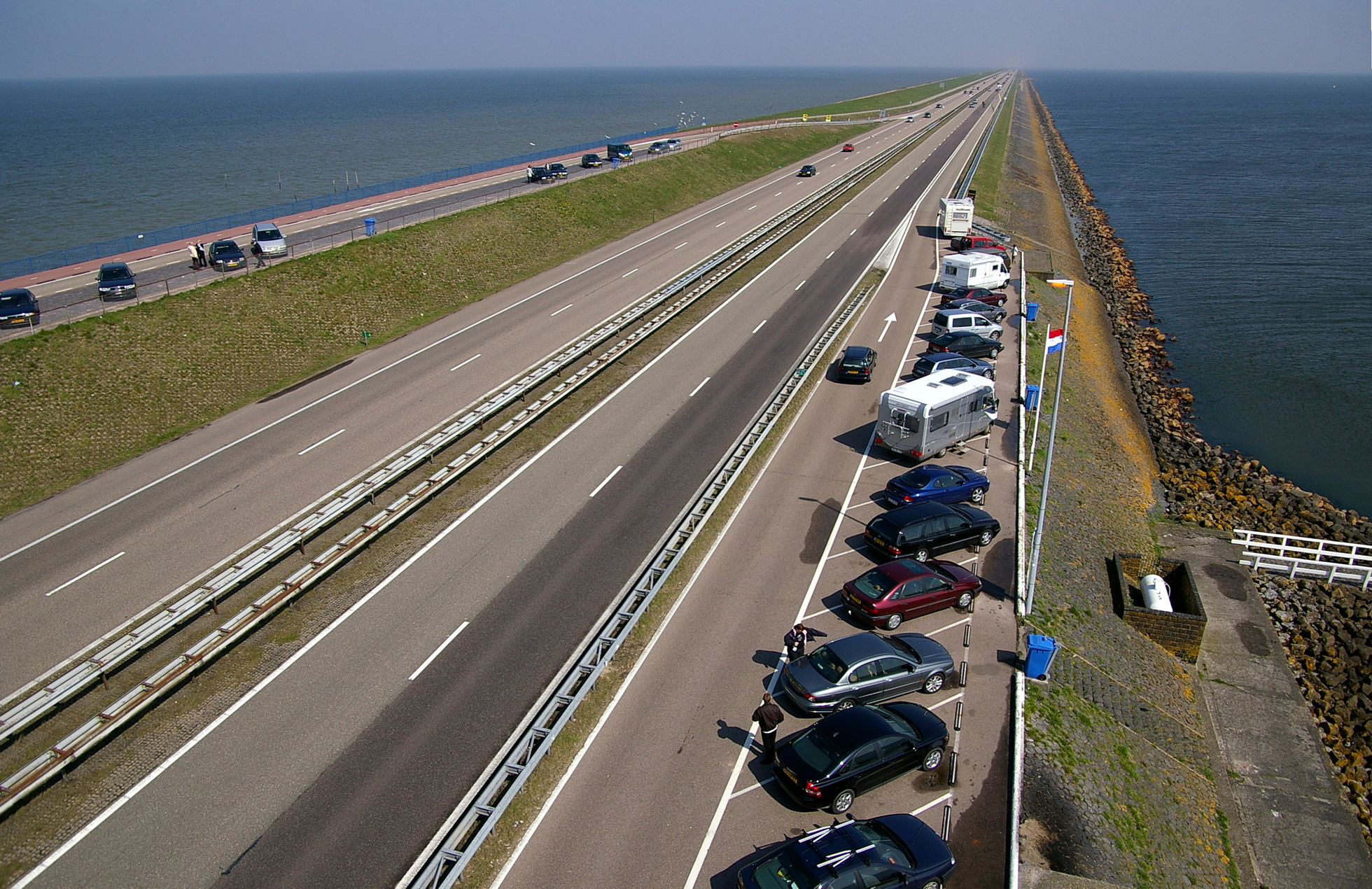 Der Abschlussdeich in den Niederlanden, aufgenommen vom Aussichtsturm in Blickrichtung Norden. Linkerhand die Nordsee (Salzwasser), rechterhand das IJsselmeer (Süßwasser).